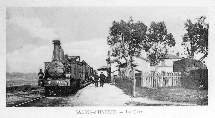 Intérieur de la gare avec desserte par un train vapeur.